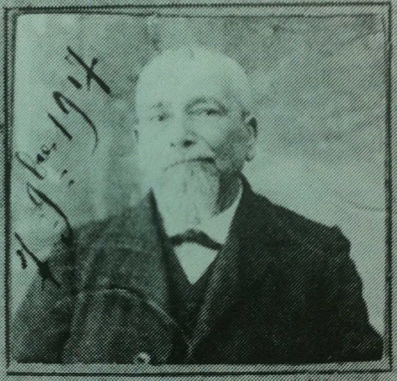 Shalom Bekache (1848-1927), a Jewish-Algerian (of Baghdadi-Indian origin) journalist, writer, publisher and translator to Judeo-Arabic.